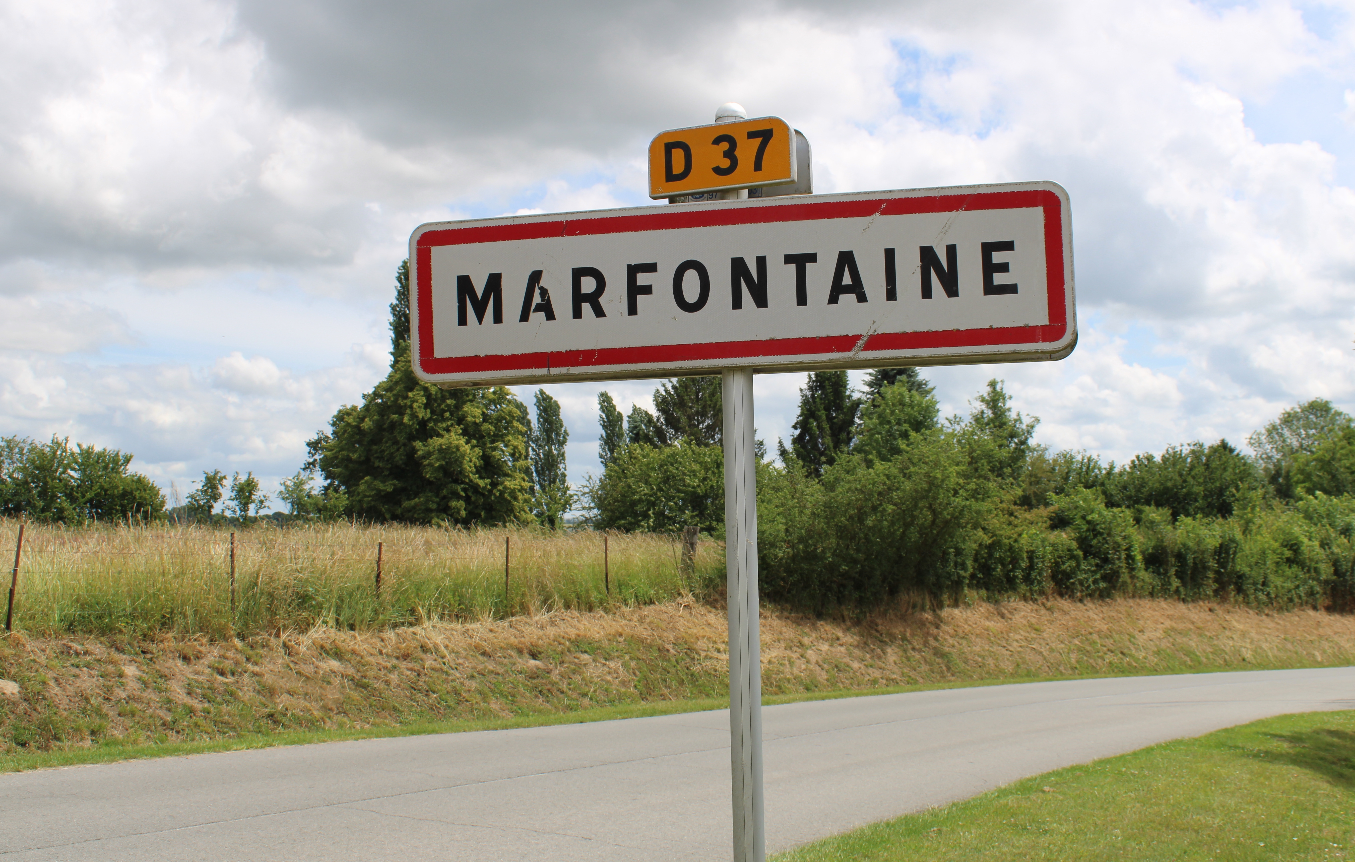 Entrée du village